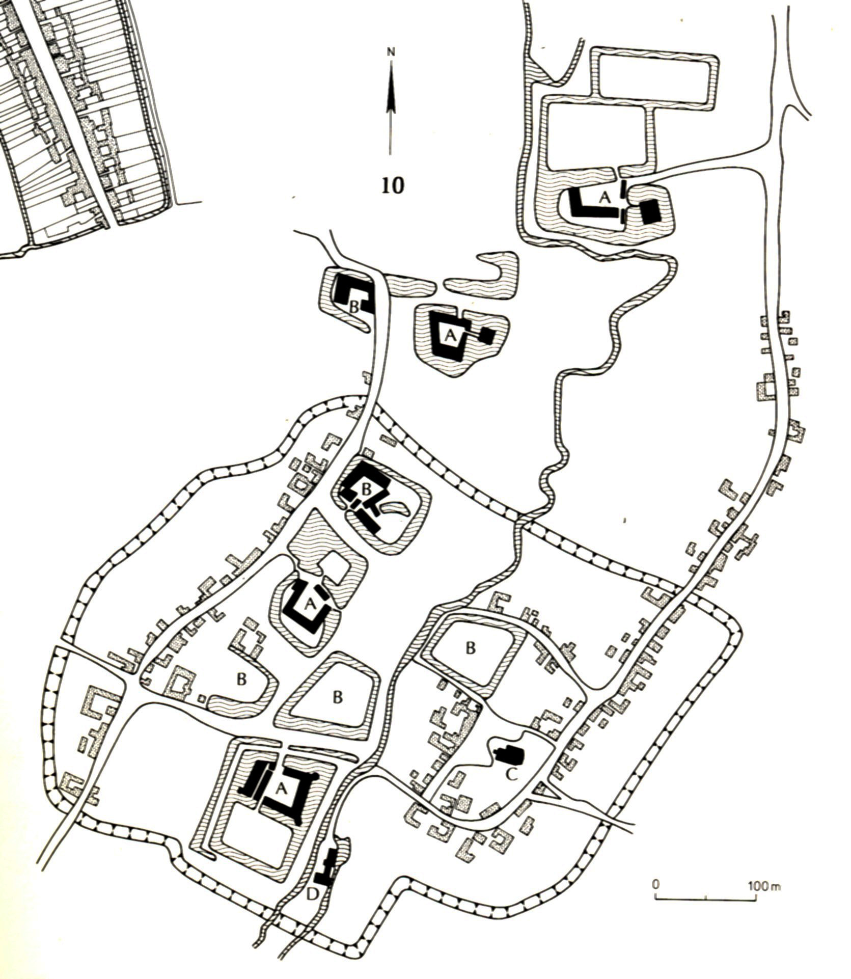 Friesheim (Erftstadt), Katasterkarte aus dem Jahr 1811